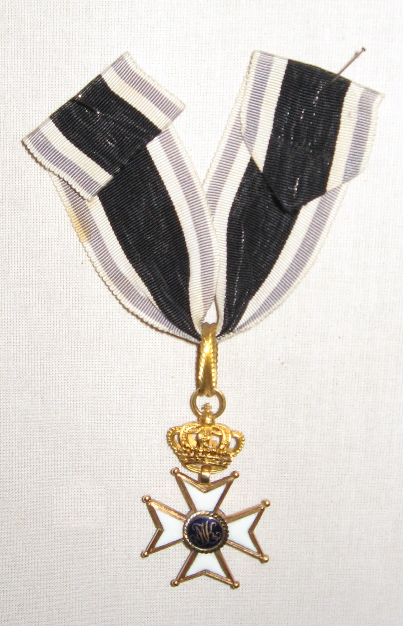 Militär-Max-Joseph-Orden: Kommandeurkreuz, Rückseite